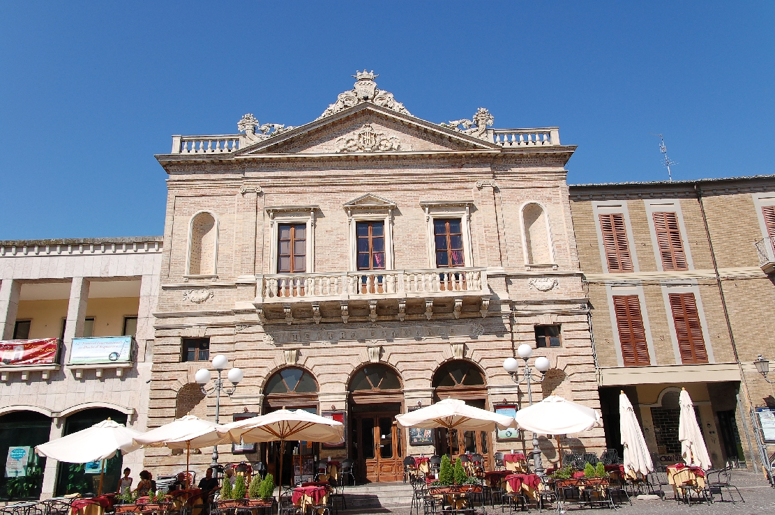 Atri 2011